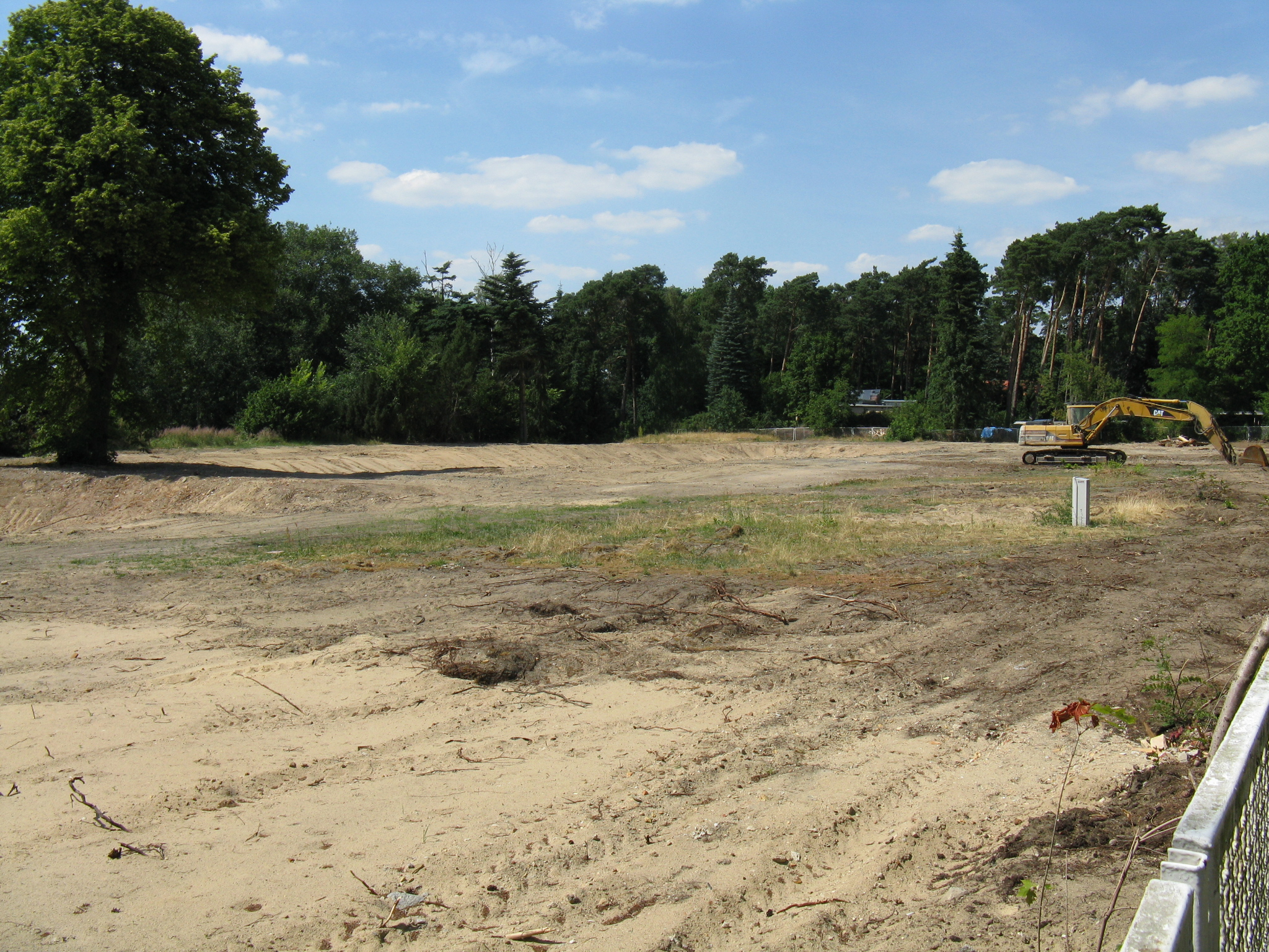 Beräumte Grundfläche des Gästehauses mit seinen Nebenanlagen